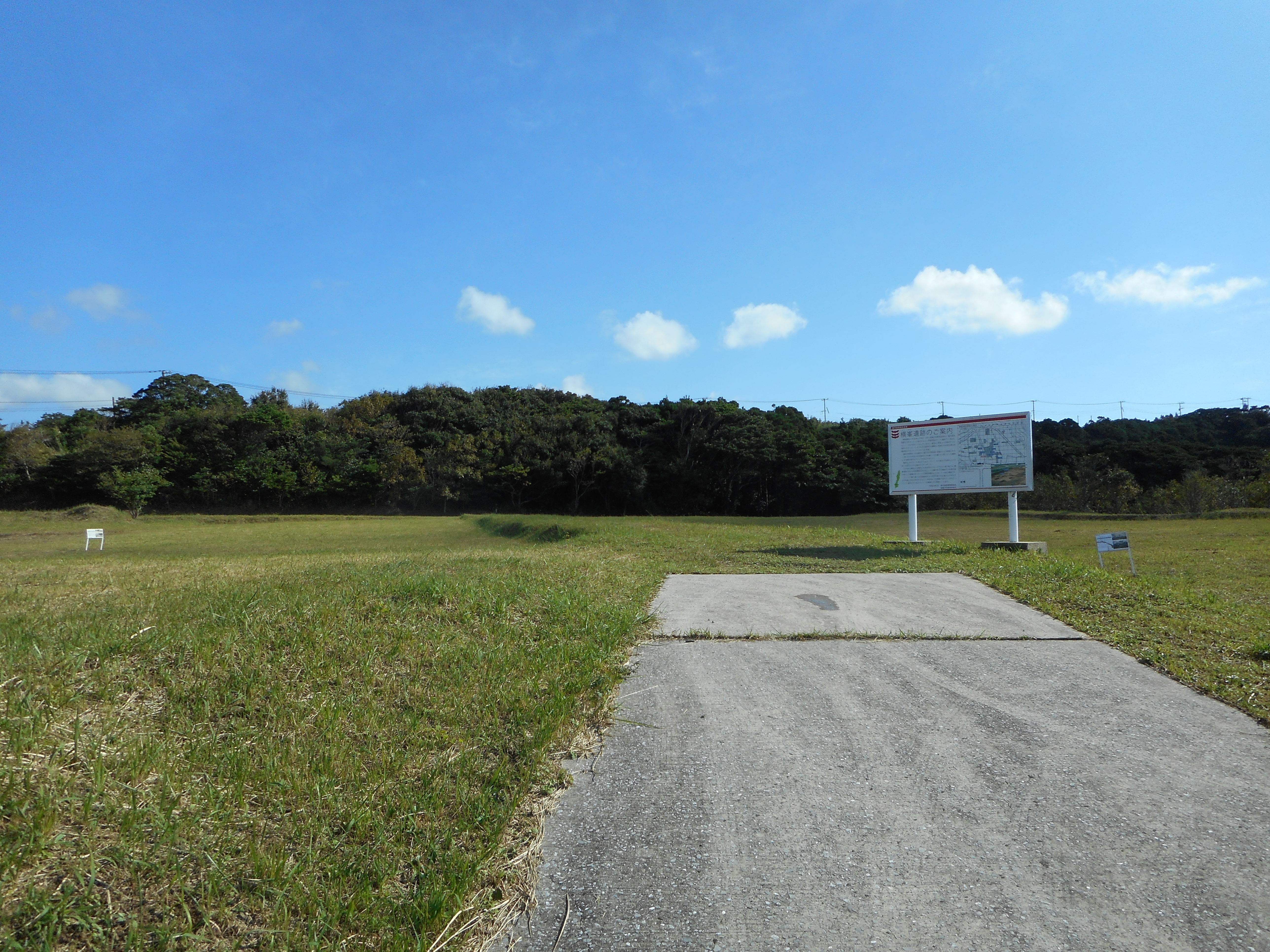 横峯遺跡 正面